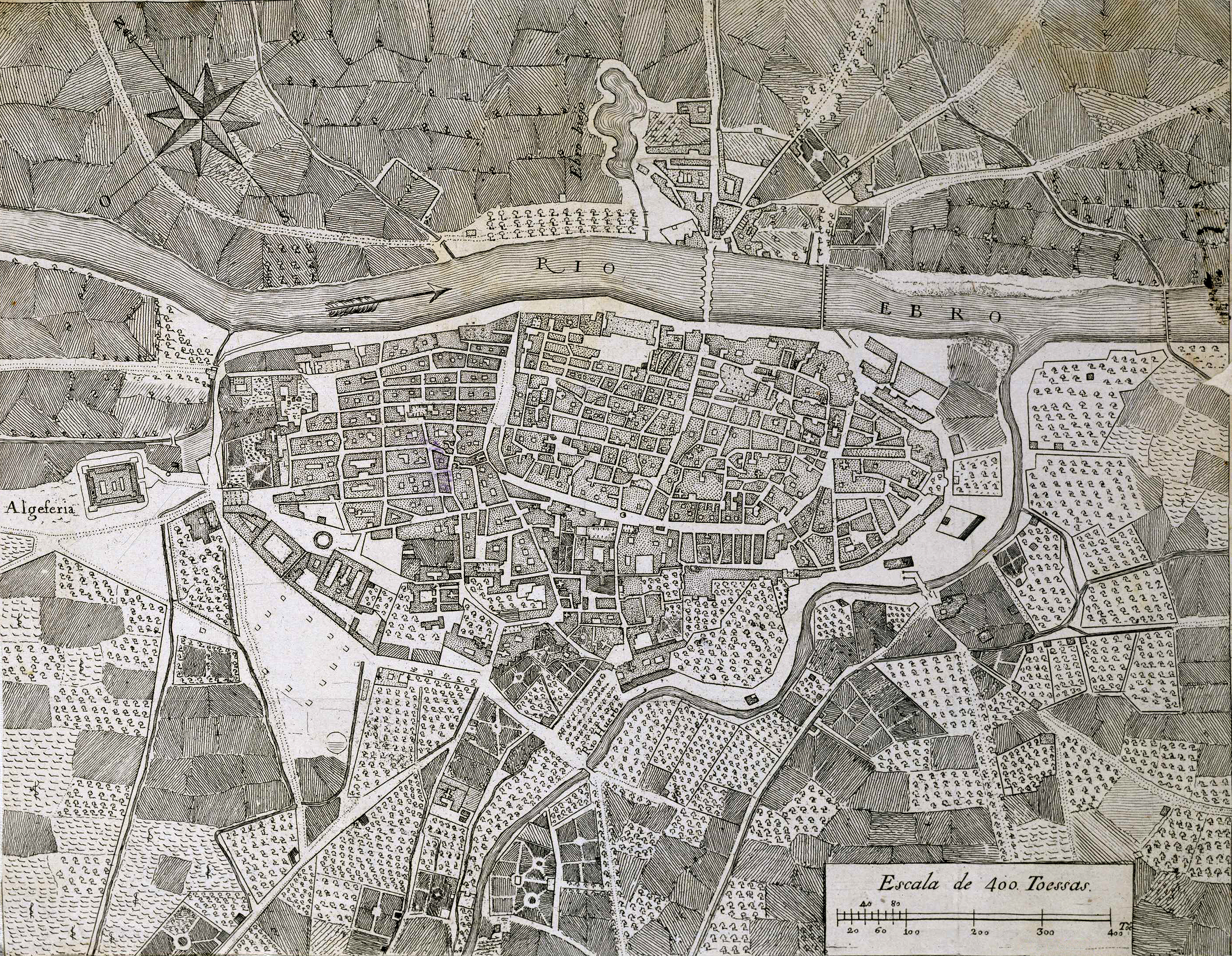 Plano topográfico de la ciudad de Zaragoza del siglo XVIII